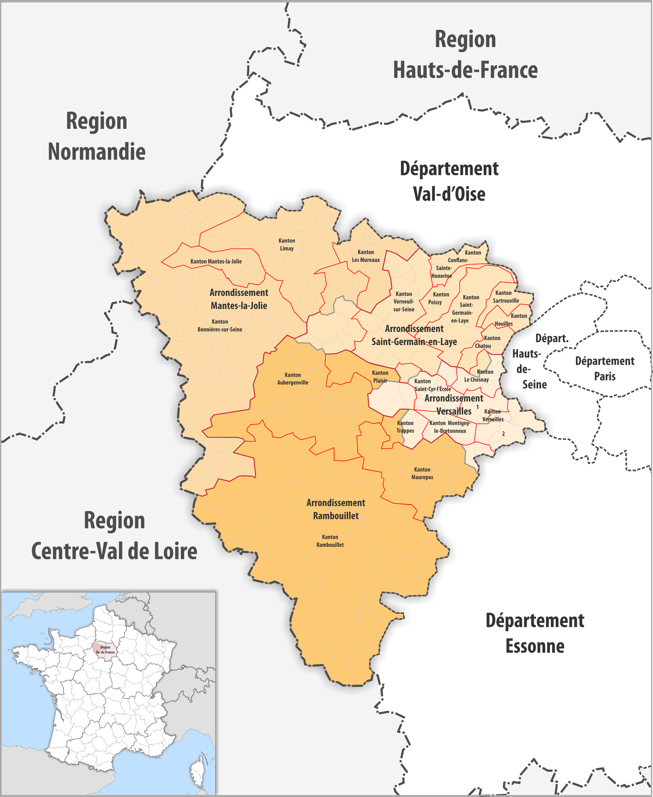 Gemeinden, Kantone und Arrondissemente im Departement Yvelines